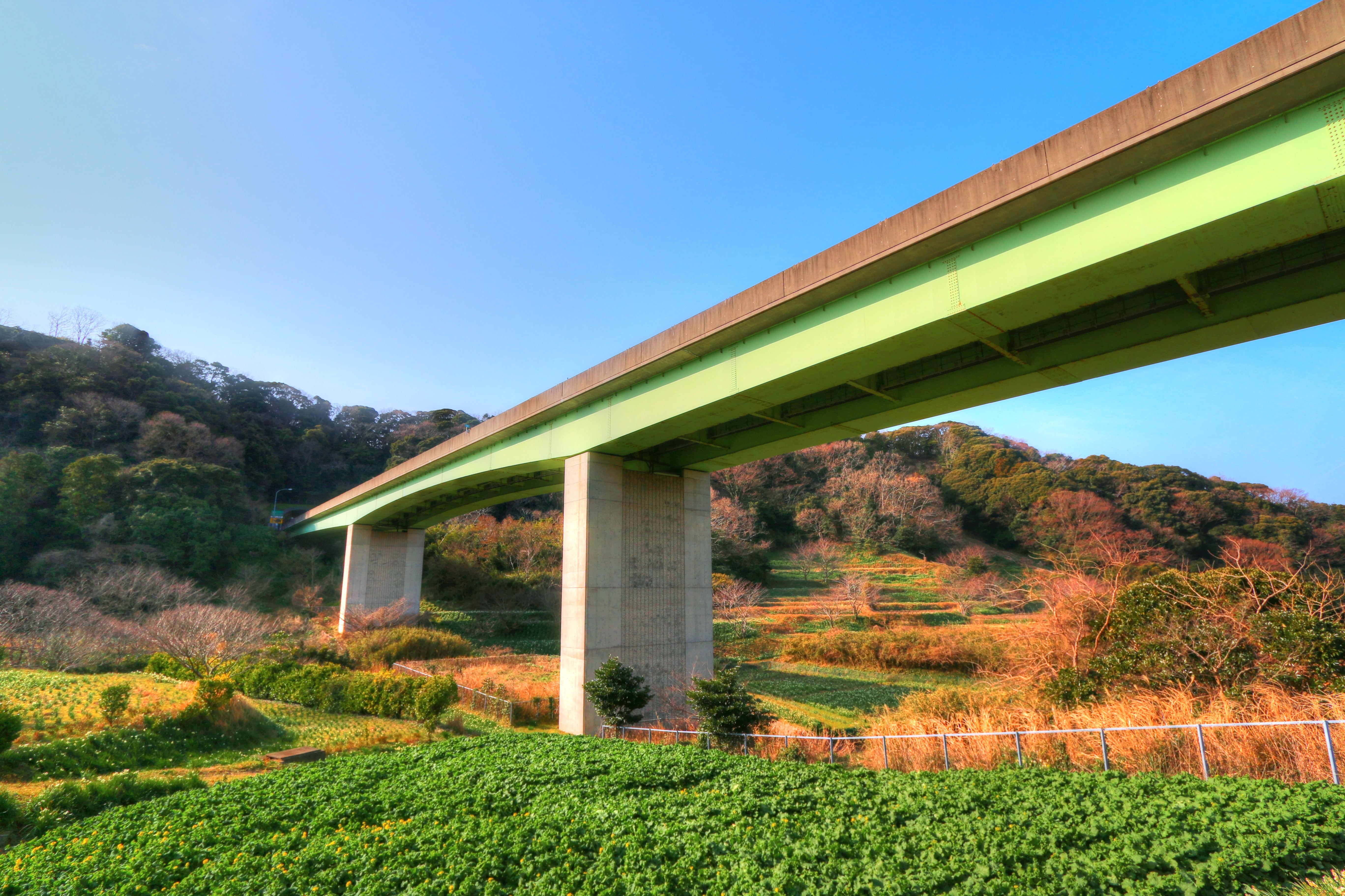 富津館山道路